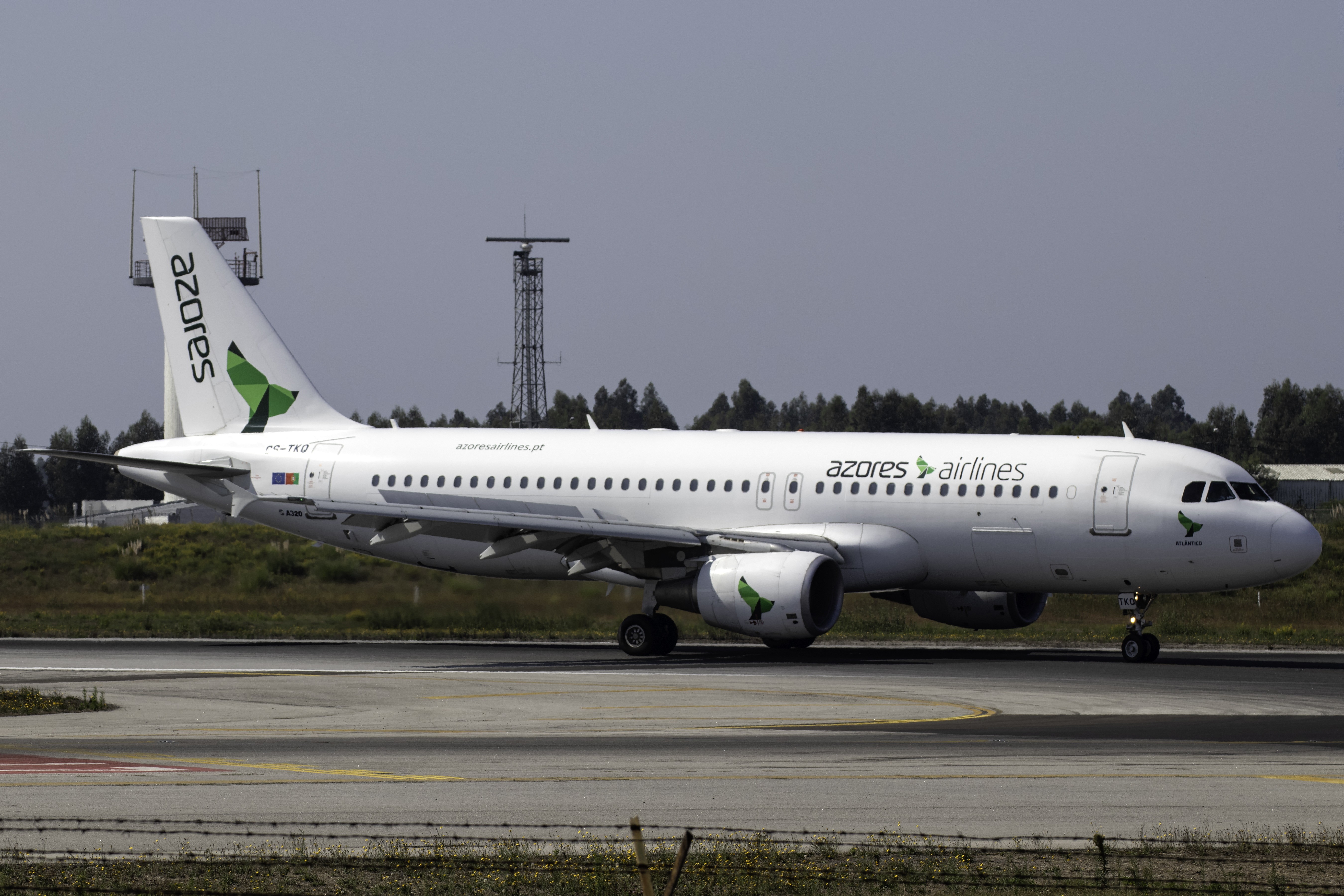 Airbus A320 de Azores Airlines tras aterrar no aeroporto do Porto.